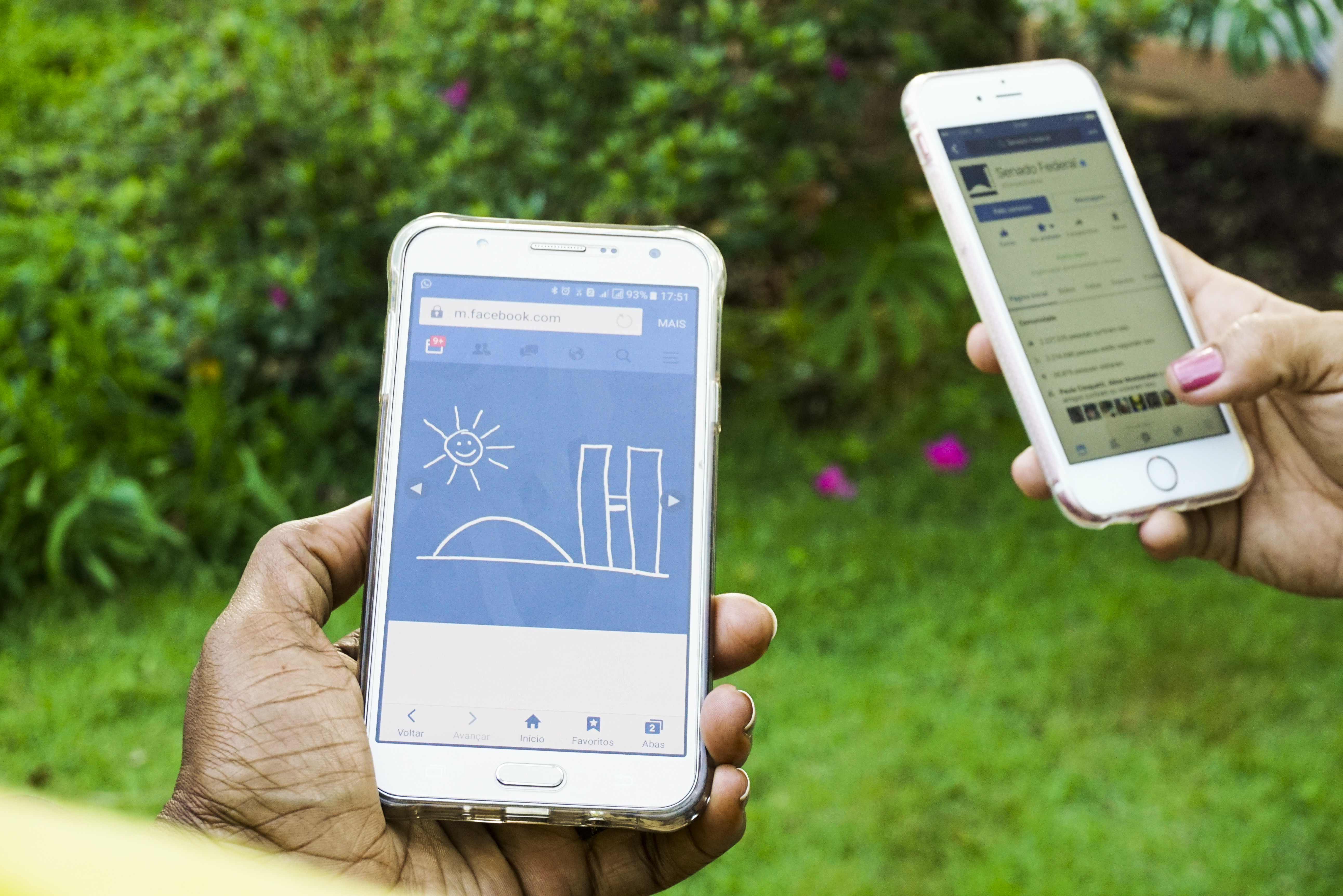 O relacionamento do Senado Federal com o cidadão por meio das mídias sociais tem crescido de forma surpreendente. A página do Facebook alcançou a quarta posição entre as páginas de governo no Brasil e já são mais de 2,2 milhões de pessoas que acompanham e discutem as votações, os pronunciamentos e os projetos que tramitam na Casa. O perfil também está entre aquelas de maior repercussão no mundo na categoria governo, ao lado da Casa Branca e da Nasa. Somente neste ano, as publicações da página já foram compartilhadas quase 10 milhões de vezes e geraram mais de 3 milhões de comentários dos cidadãos. Foto: Pillar Pedreira/Agência Senado